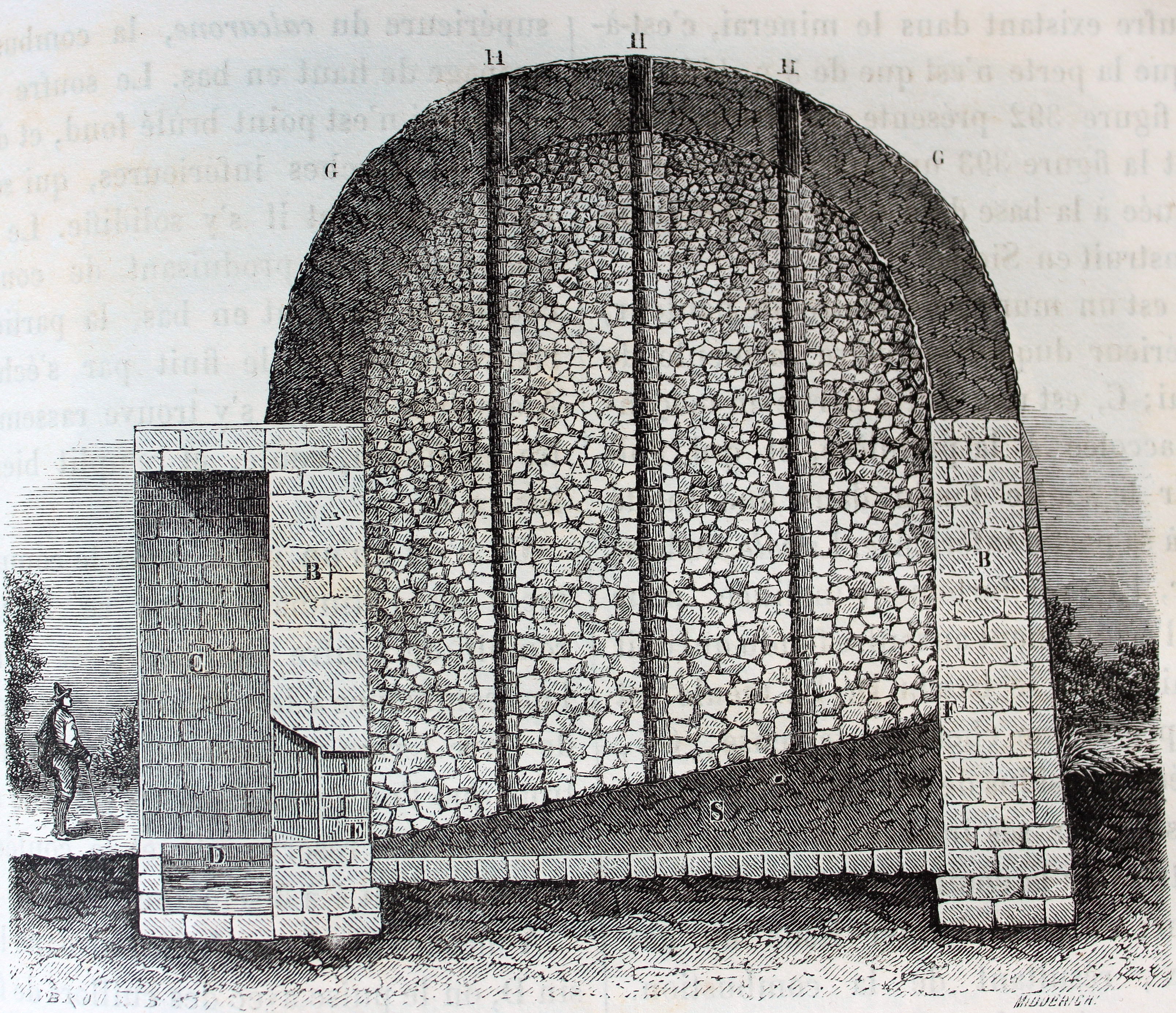 "Un calcarone ou meule de soufre en Sicilie". Ilustraciones de la obra : Les merveilles de l'industrie ou, Description des principales industries modernes / par Louis Figuier. - Paris : Furne, Jouvet, [1873-1877]. - Tome I